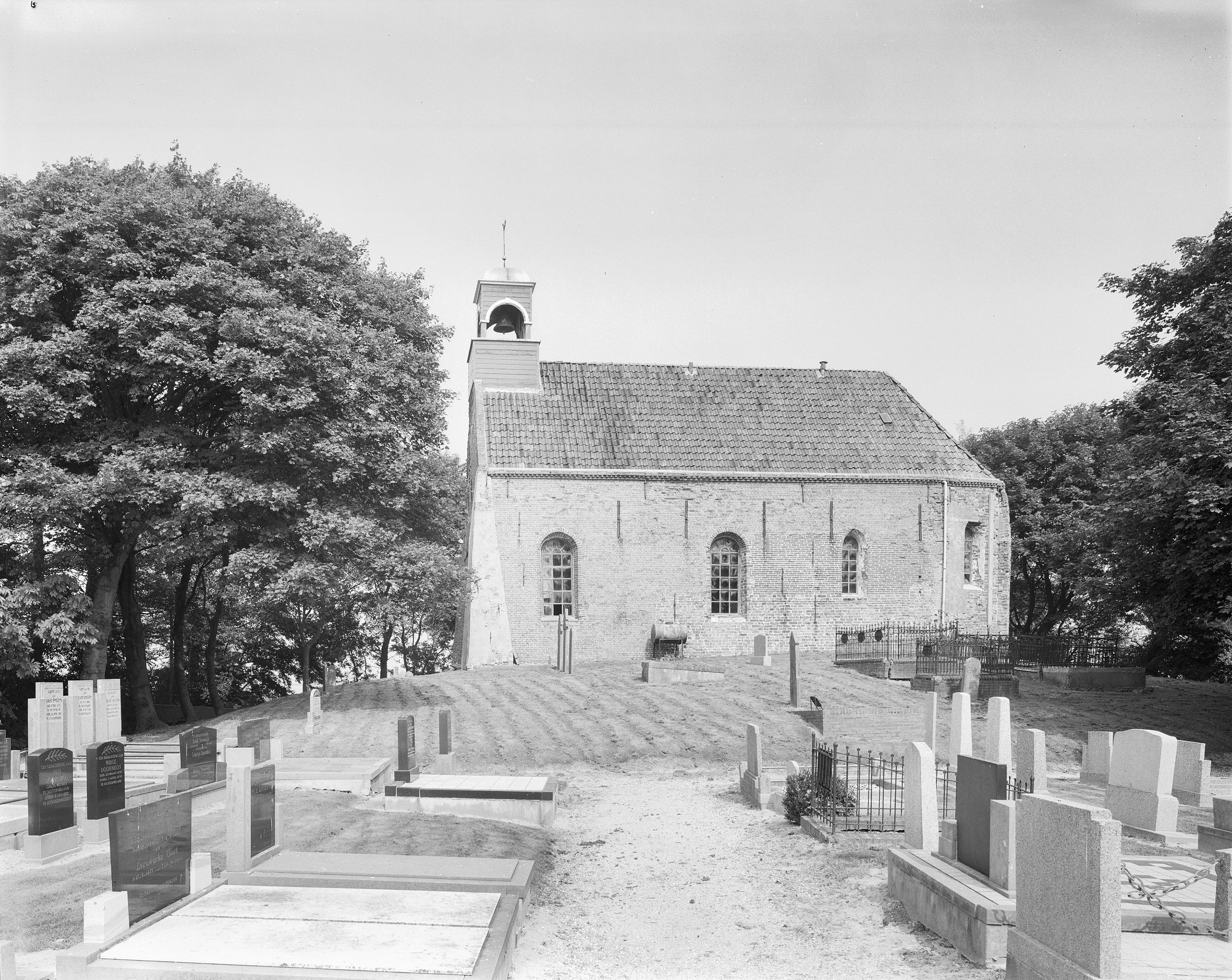 Nederlands Hervormde Kerk: zuidgevel